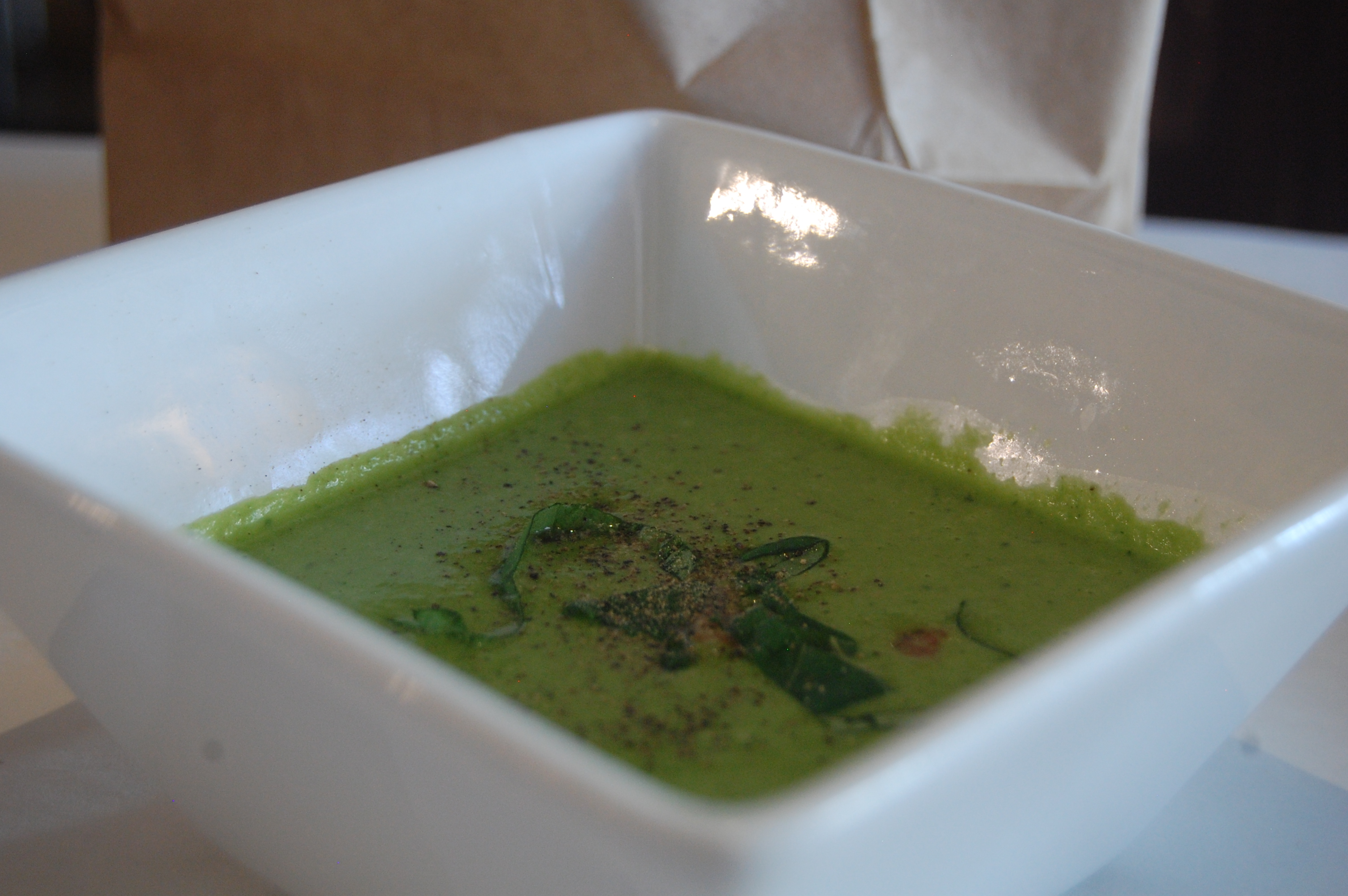 Avocado soup